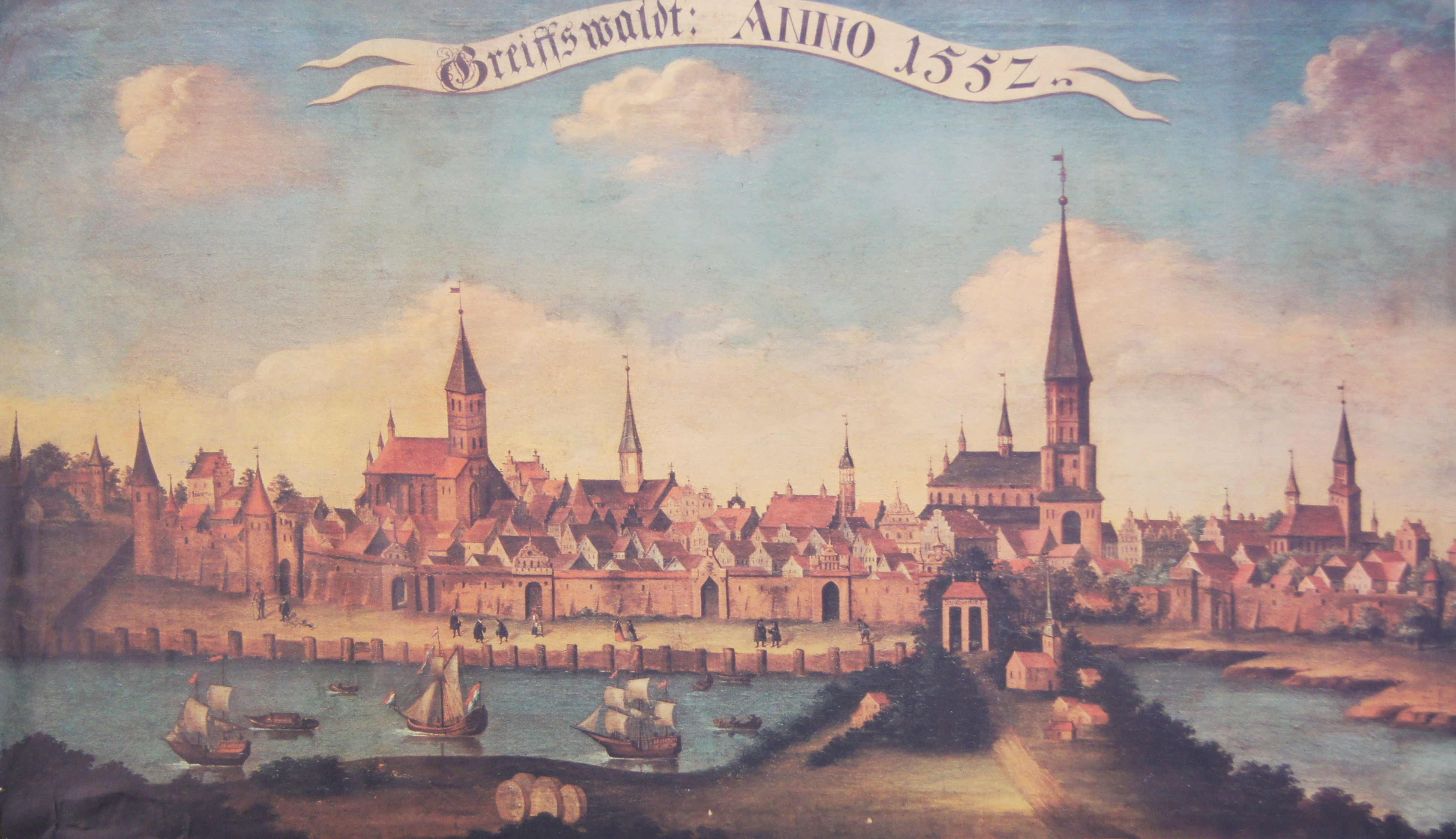 Ansicht von Greifswald aus dem Jahre 1552